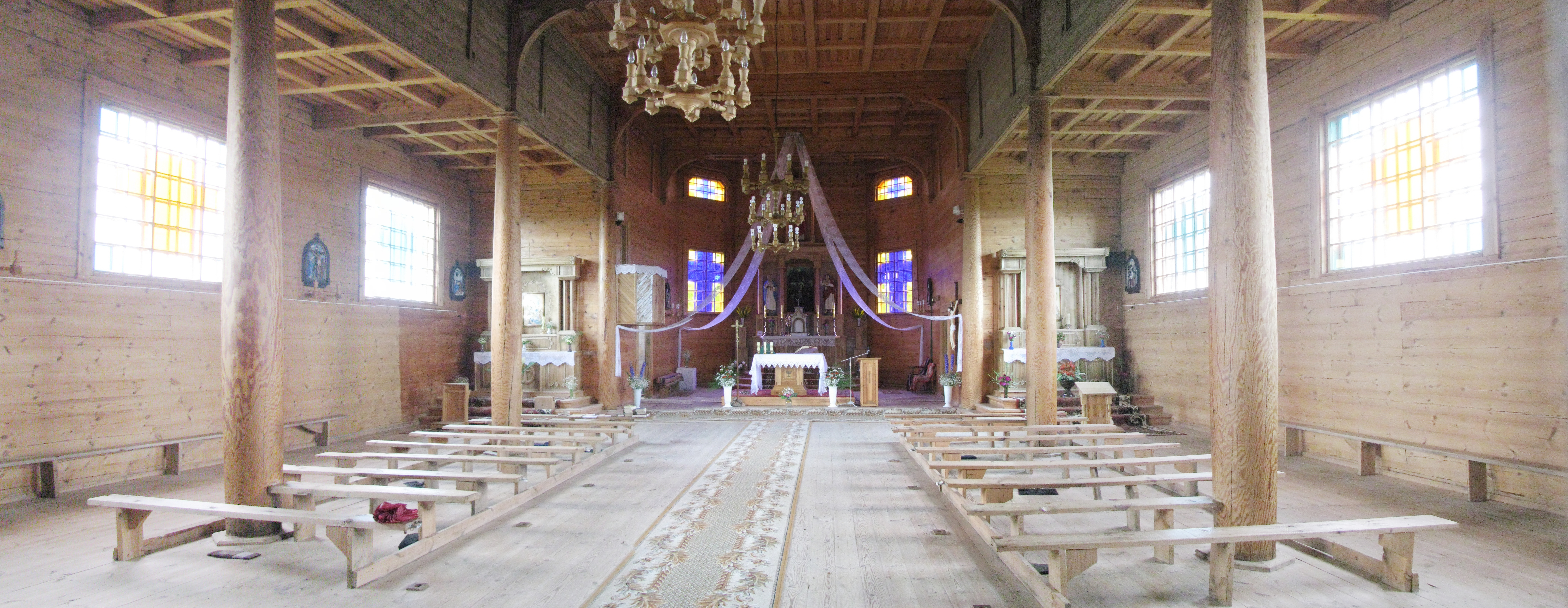 Беларуская (тарашкевіца): Петрапаўлаўскі касьцёл. в. Дрысьвяты This is a photo of Belarusian heritage monument. Reference number: 213Г000188 ( WLM)